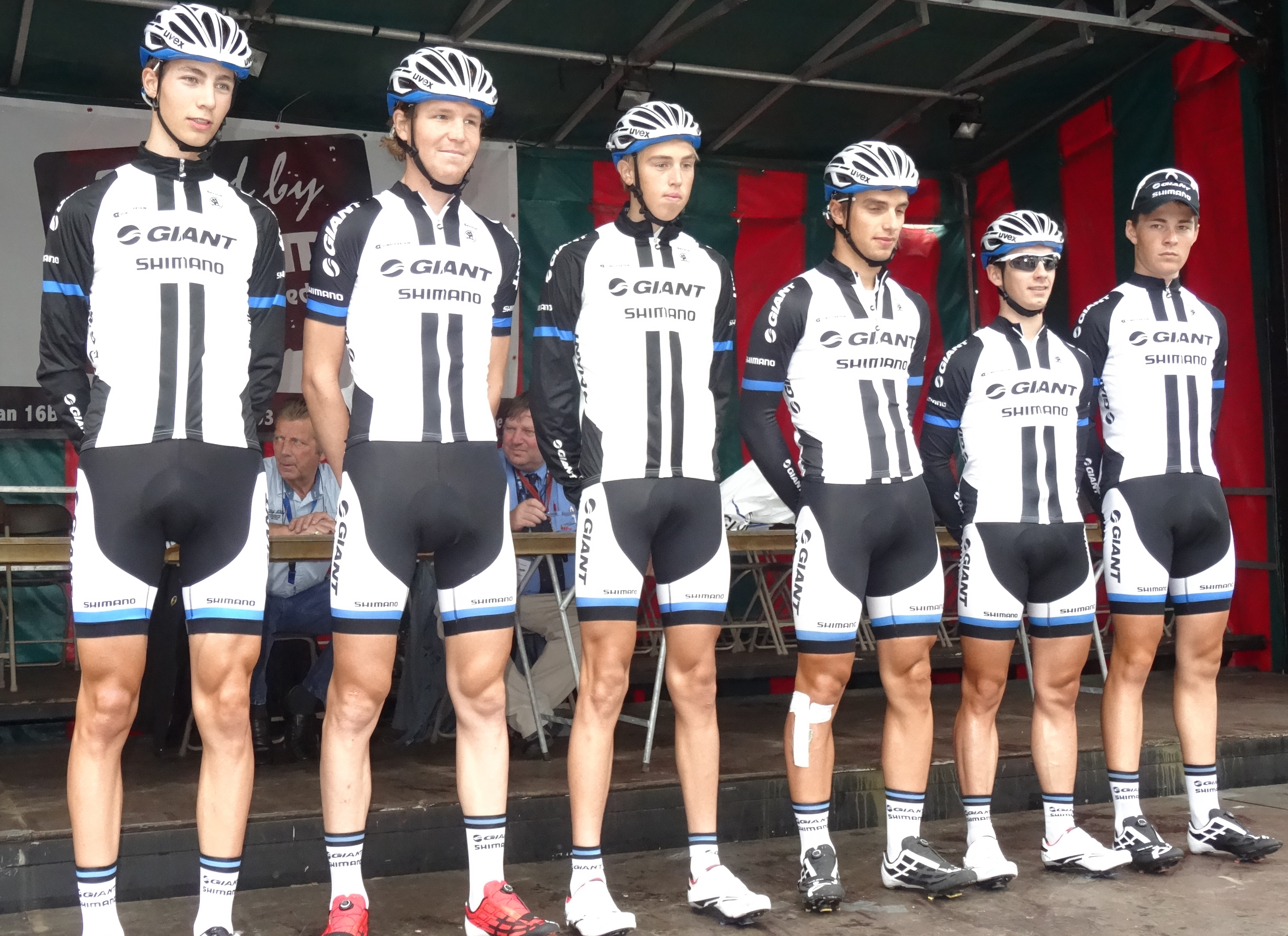 Reportage photographique réalisé le dimanche 10 août à l'occasion du départ et de l'arrivée de la Flèche du port d'Anvers 2014 à Merksem (Anvers), Belgique.